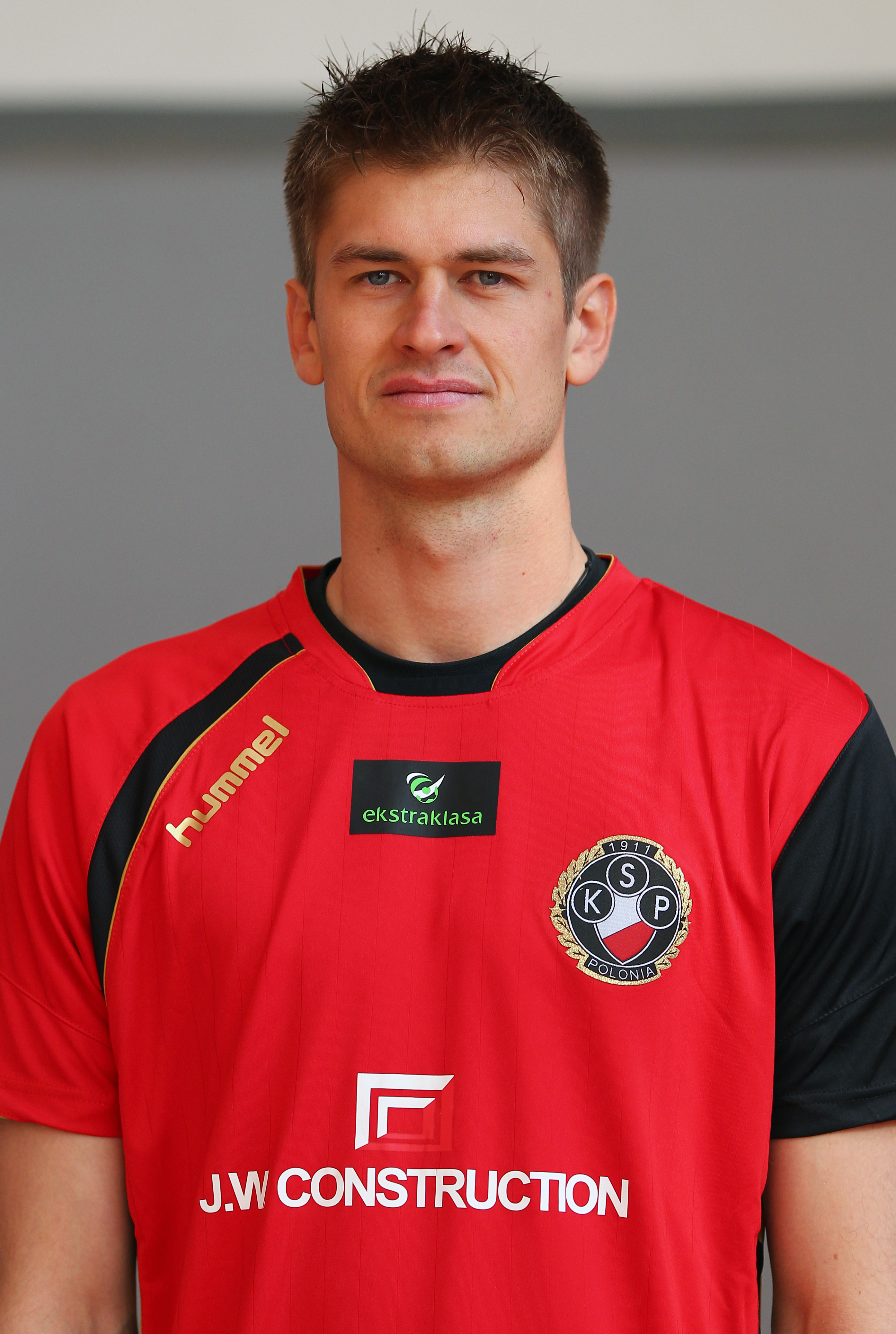 Sebastian Przyrowski, player of Polonia Warszawa (2011)